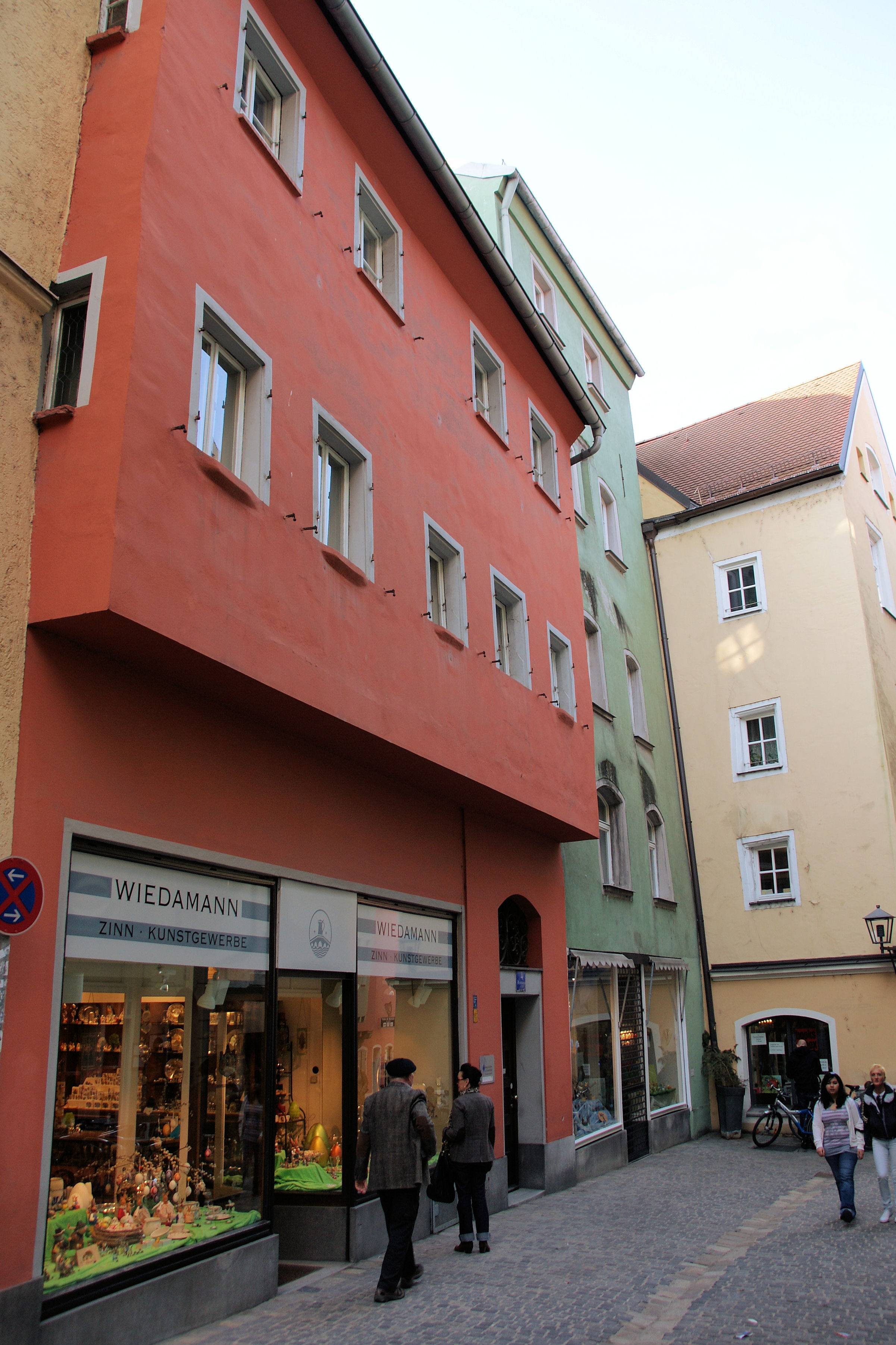 Wiedamannhaus, ehem. Kastler Hof und ehem. Gasthaus zum Wilden Mann, fünfgeschossiger Turm, Biforienfenster mit Knospenkapitell, spätromanisch, erstes Drittel 13. Jh., südlich dreigeschossiger und traufständiger Anbau mit Pultdach und Überschuss, spätgotisch, 15. Jh., über Keller des 12./13. Jh., seit dem 17. Jh. mehrfach umgebaut This is a photograph of an architectural monument.